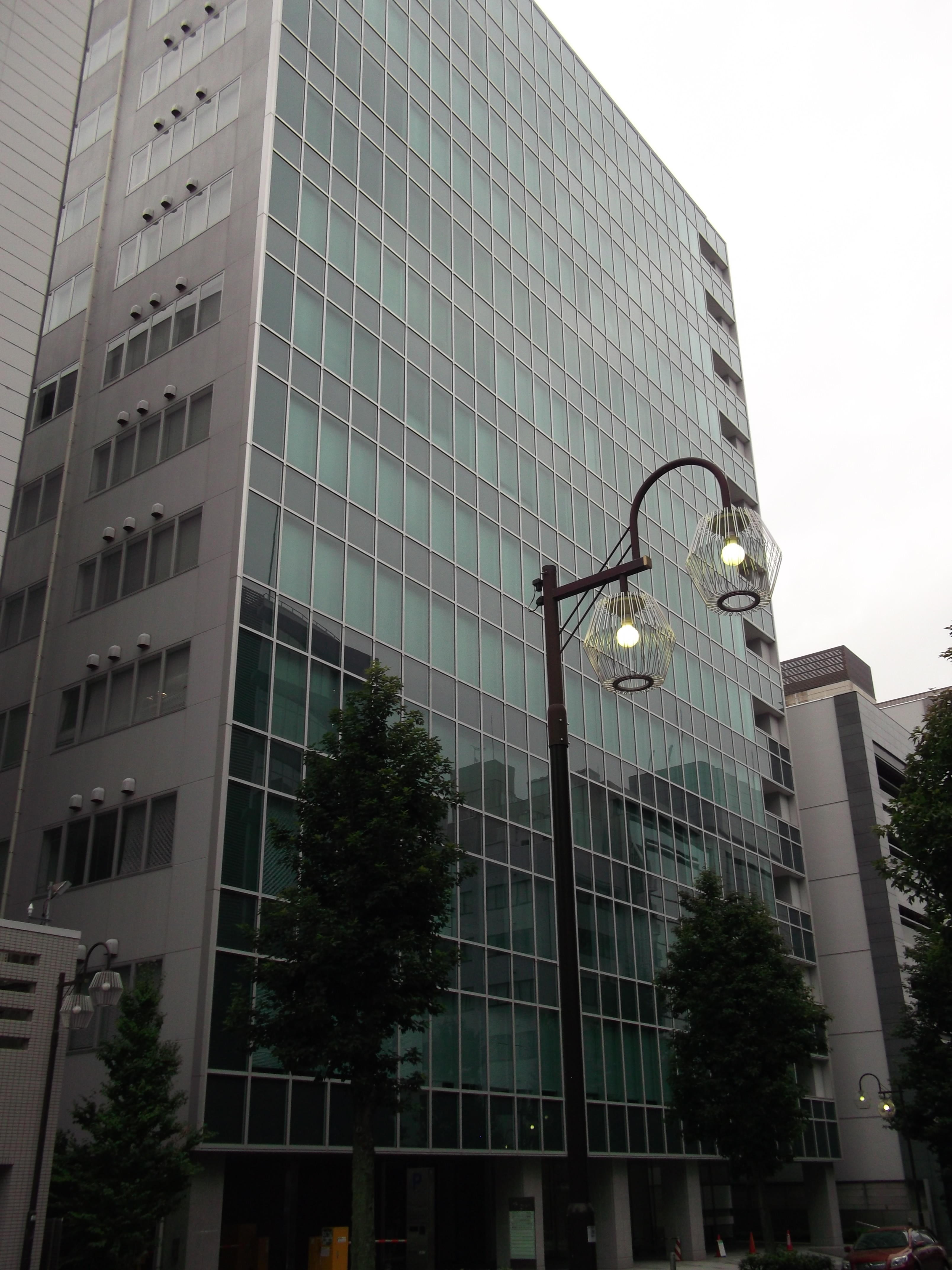 名古屋市中区のDNI錦ビルディングを北側公道東側より撮影